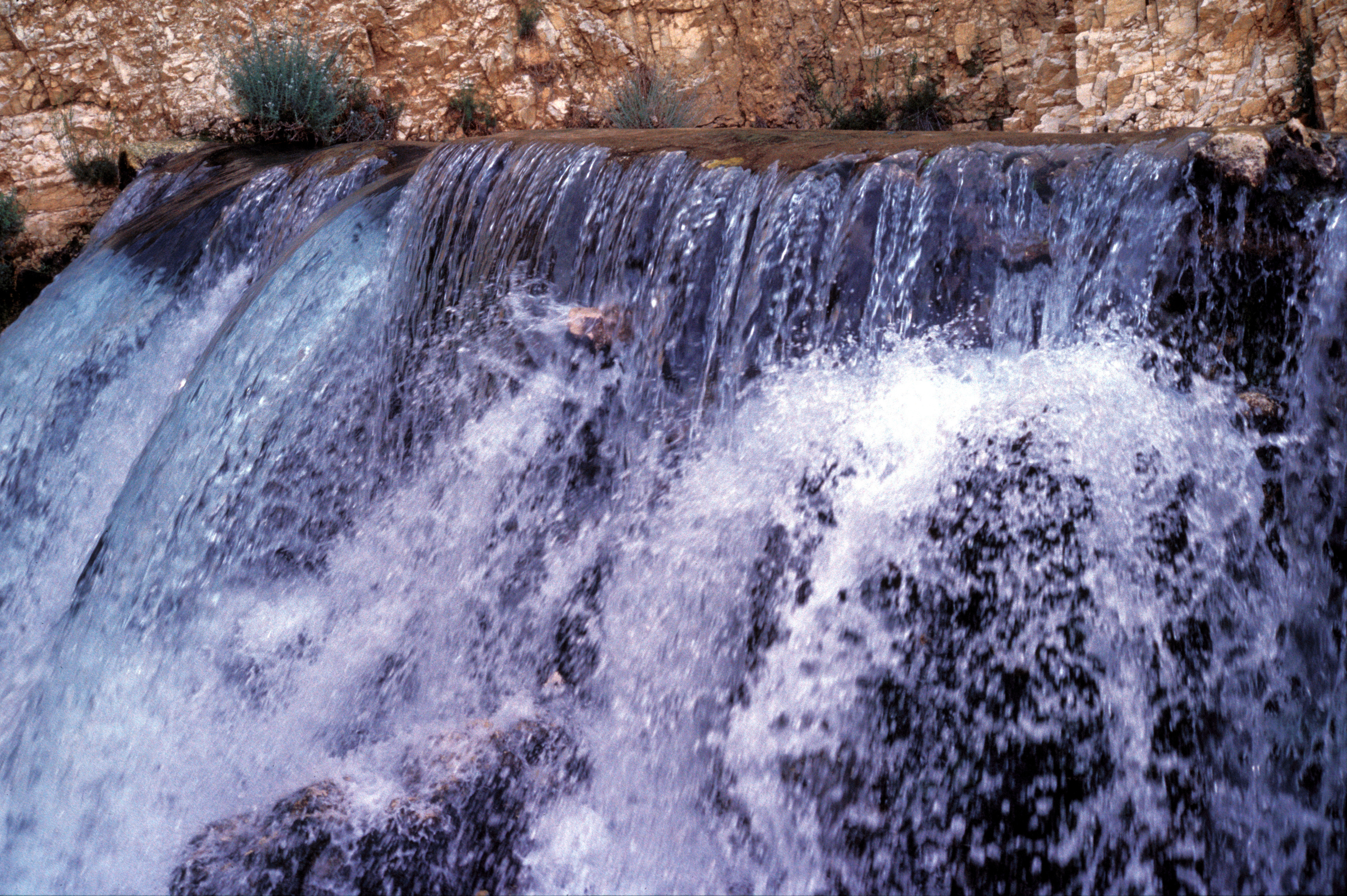 source de yammouné, Bekaa, Liban